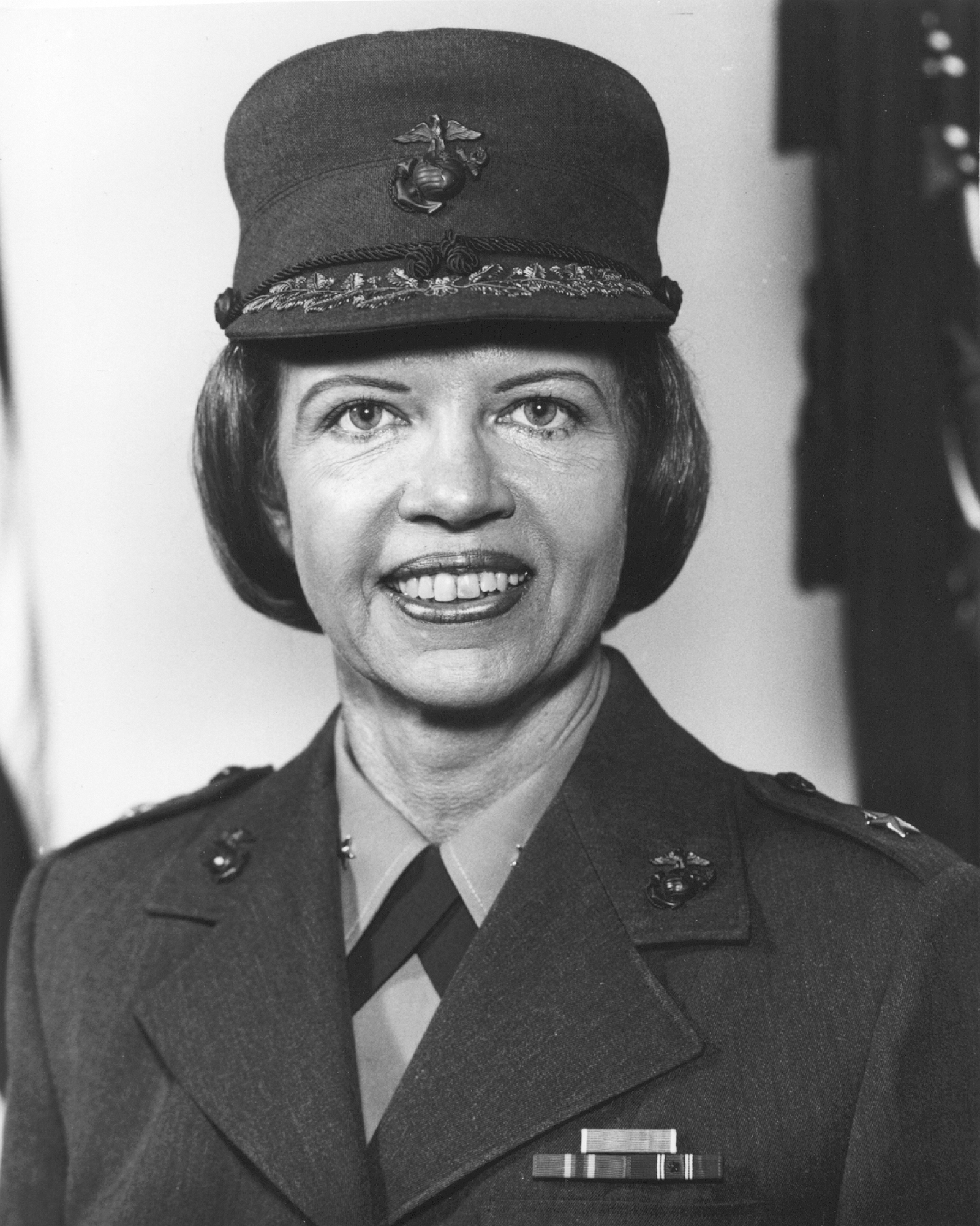 Brigadier General Margaret A. Brewer, USMC